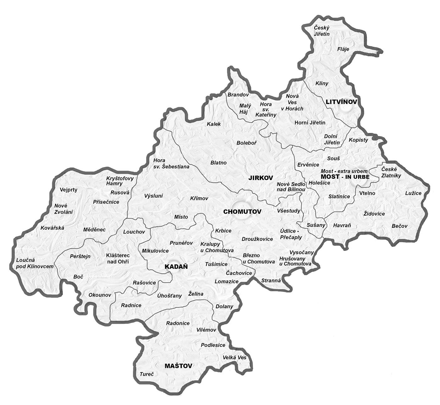 Diecéze litoměřická, krušnohorský vikariát - farnosti